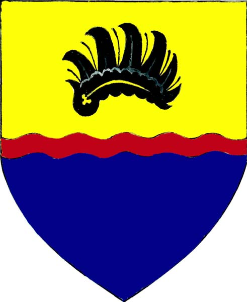 Znak obce Lazinov